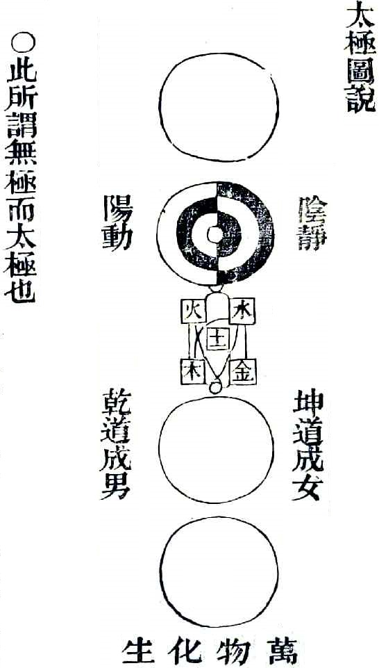 周敦頤〈太極圖說〉，《道藏》本。